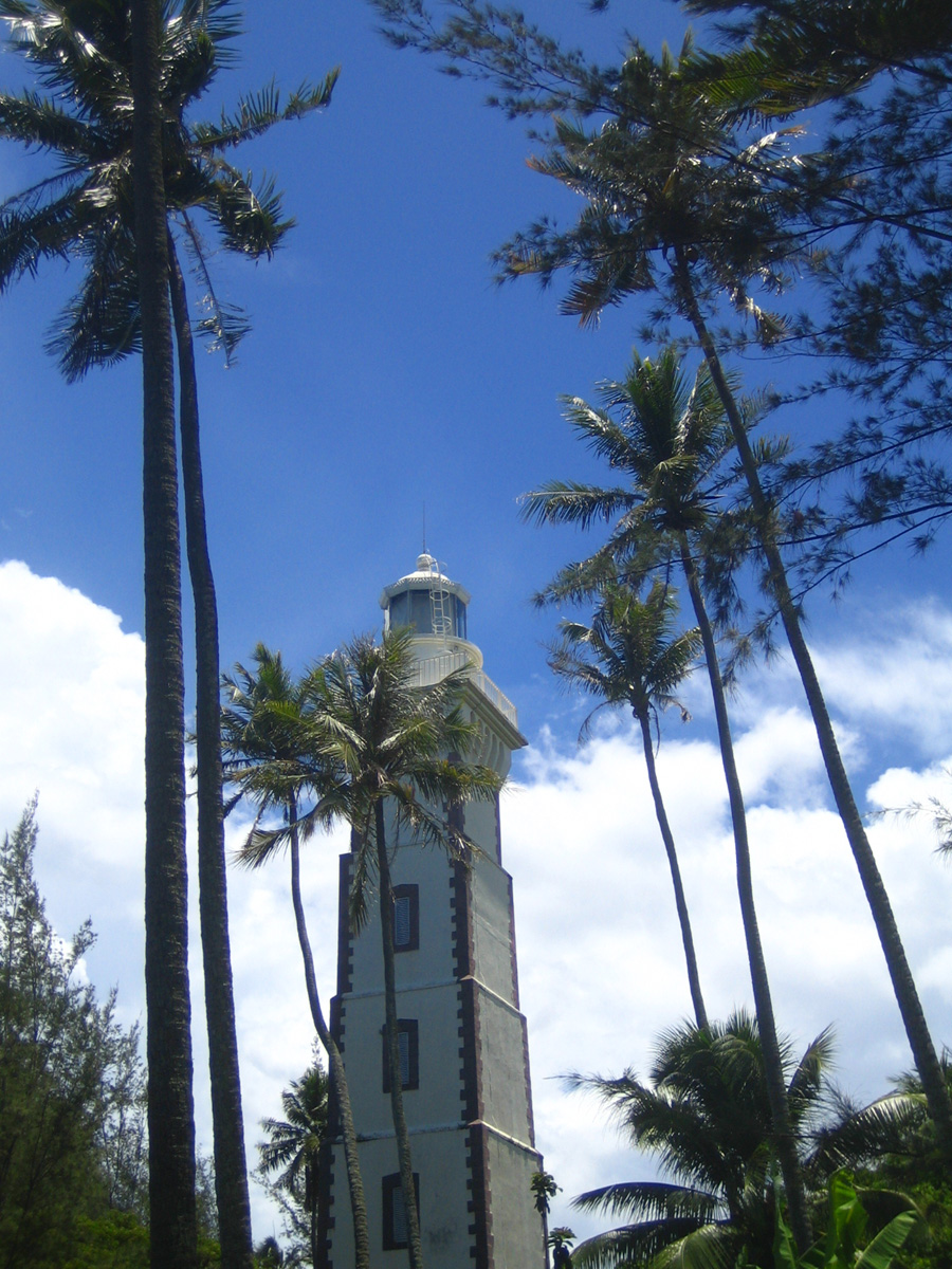 Photo phare de Mahina à Tahiti (Photo personnel 2006) Utilisateur:FRED